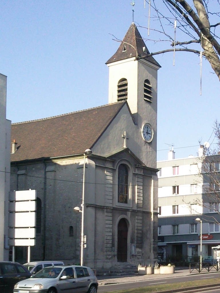 Le Bourget - Eglise Saint-Nicolas